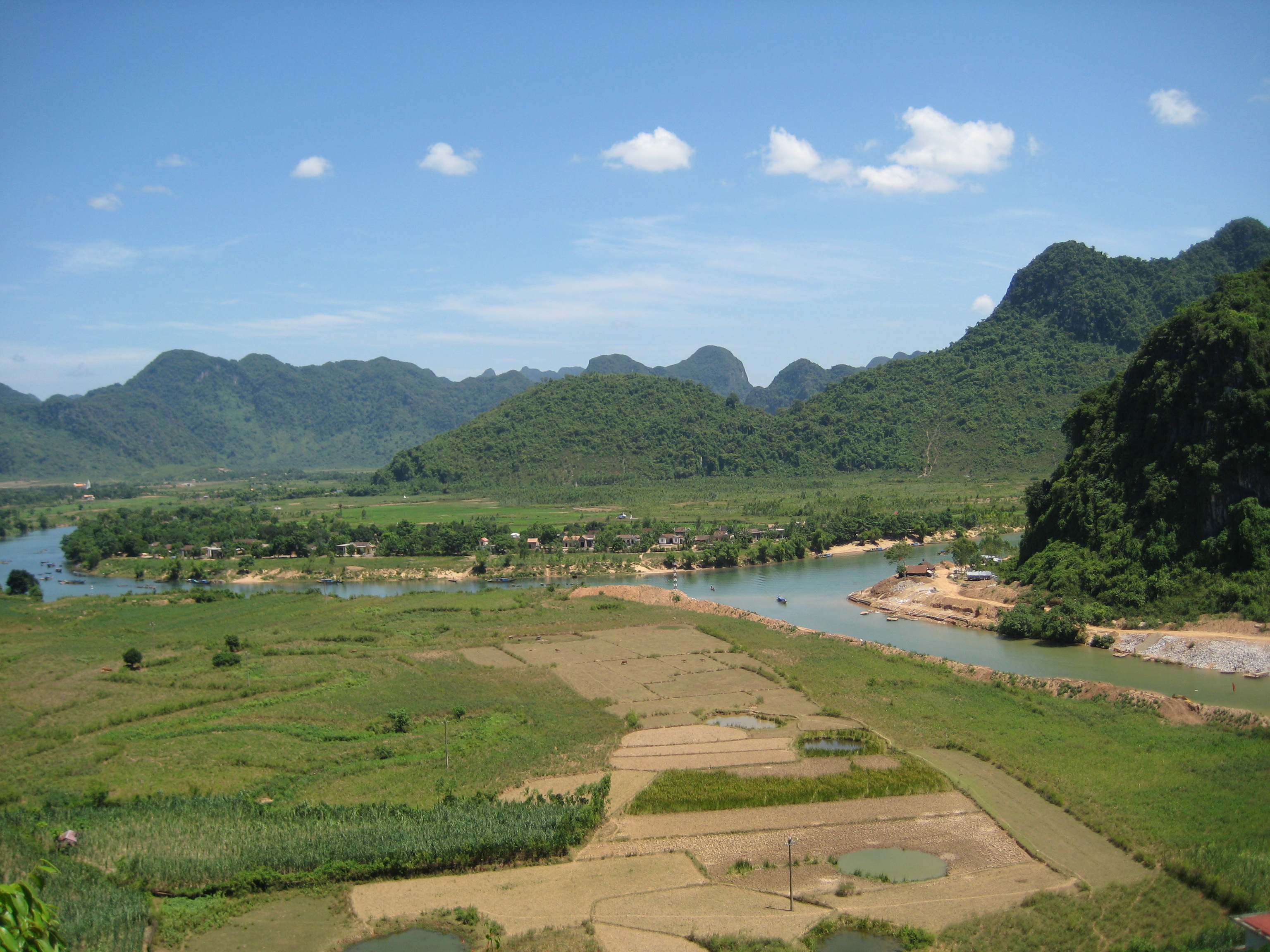 Phong Nha-Ke Bang National Park, Vietnam